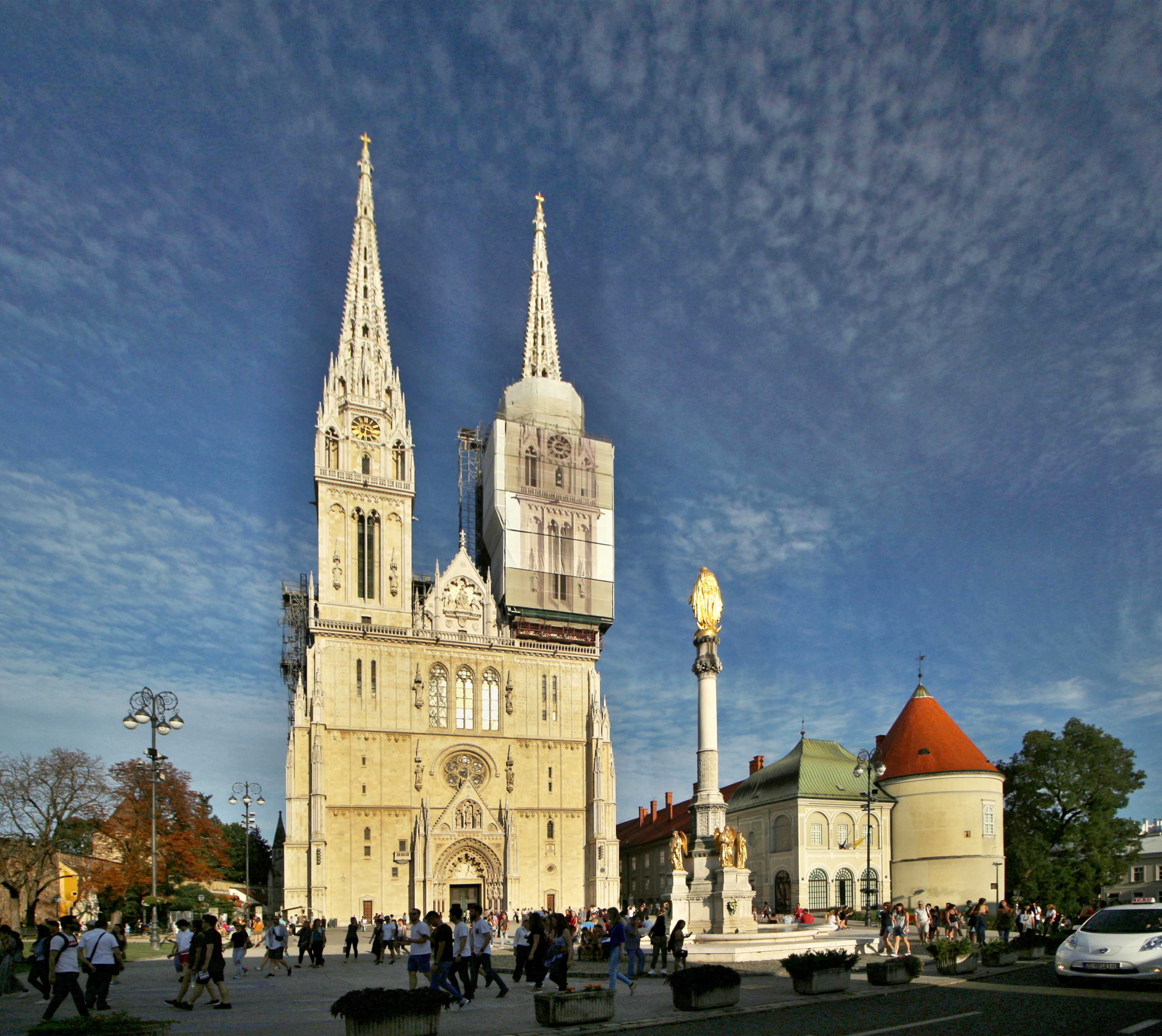 Záhřeb, Kapitol, katedrála a okolí